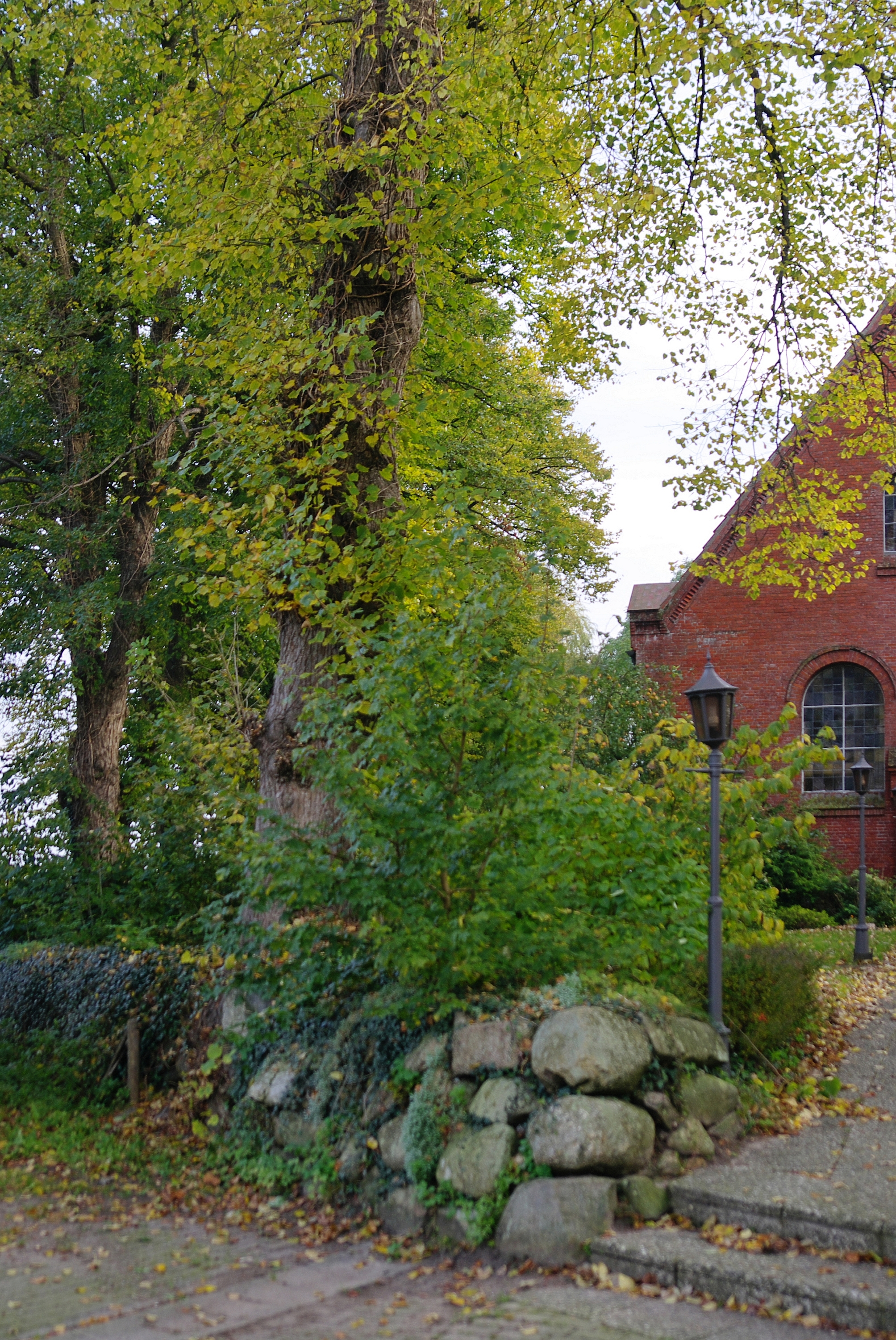 Denkmalgeschütztes Gebäude in Delve. St. Marien-Kirche Steinwall